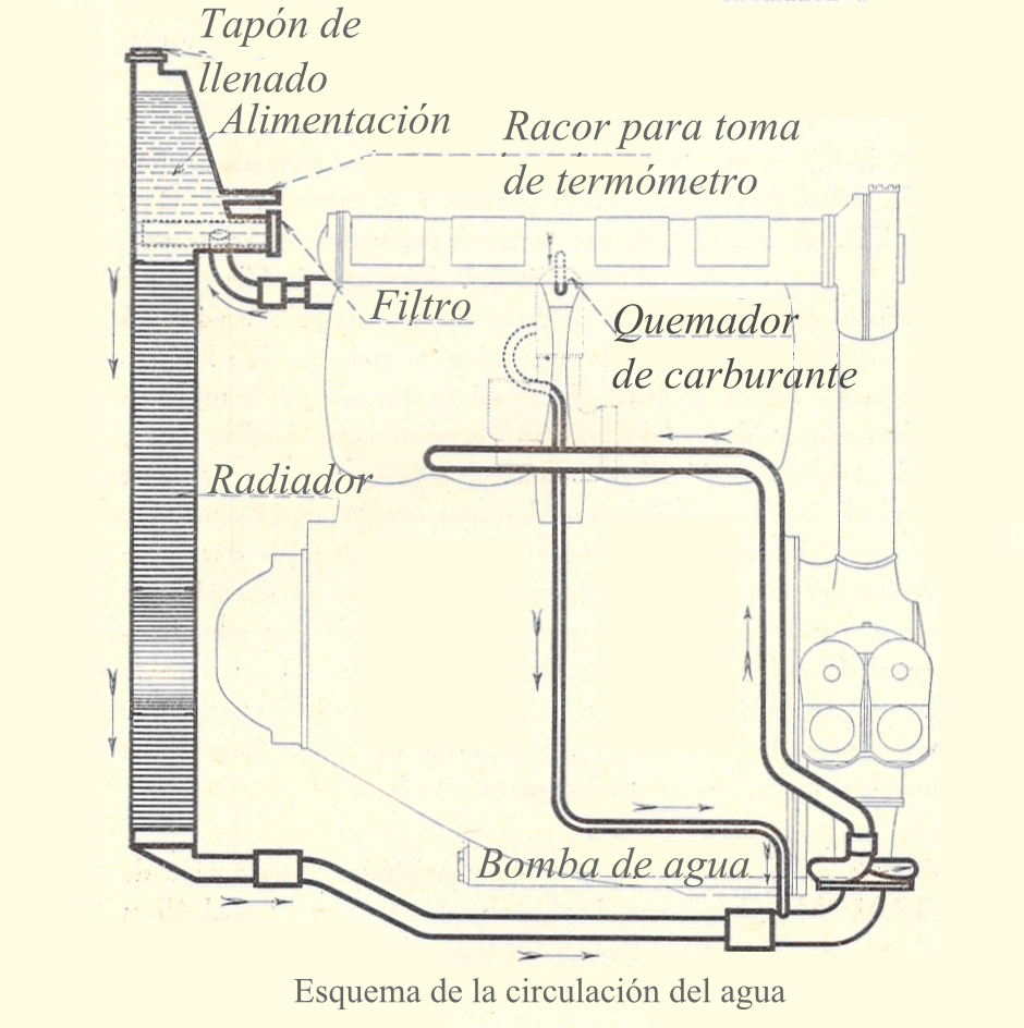 Diagrama de la refrigeración por agua en un motor de combustión interna.